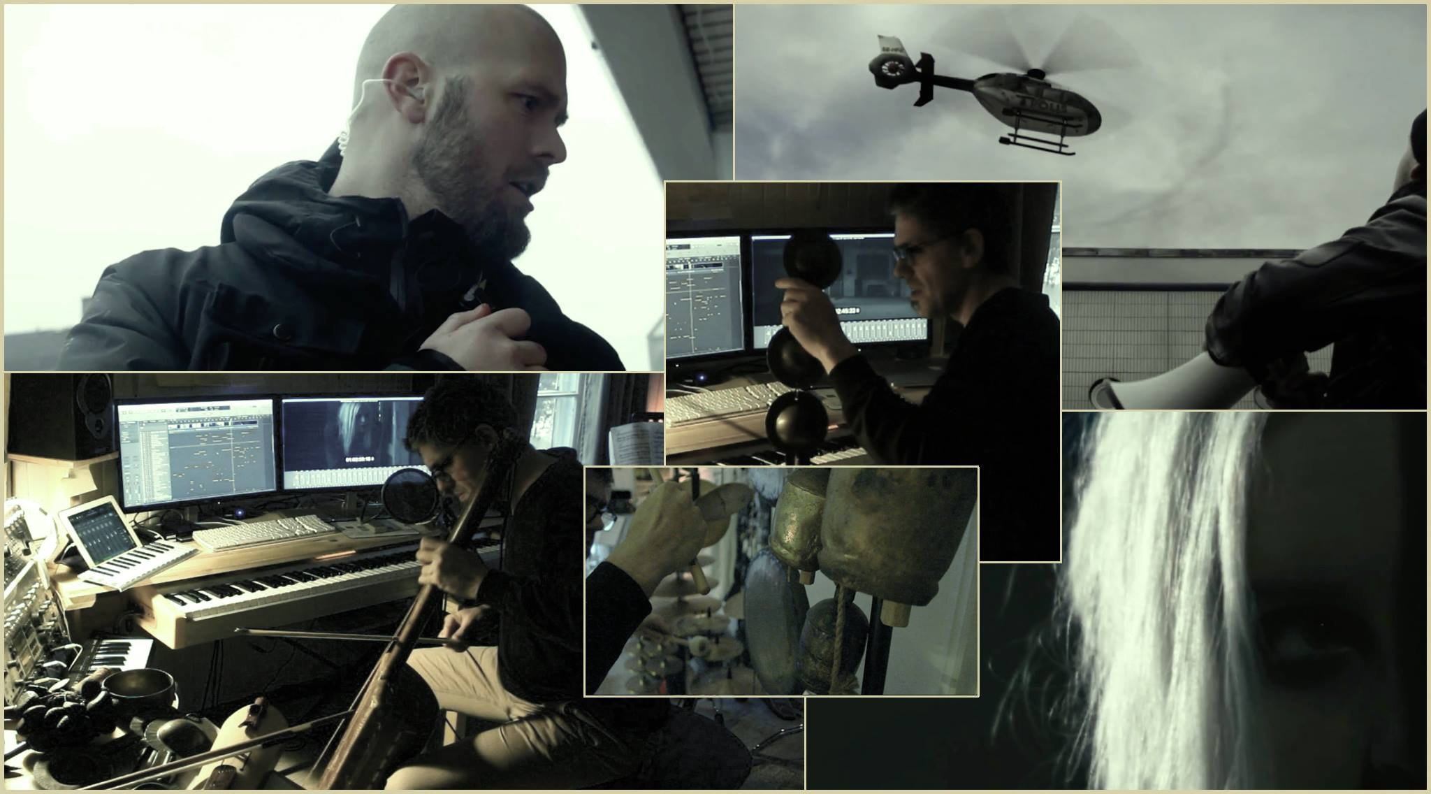 Andreu Jacob trabajando en la Banda Sonora " BRINN SOM SOLEN " Sweden © 2018